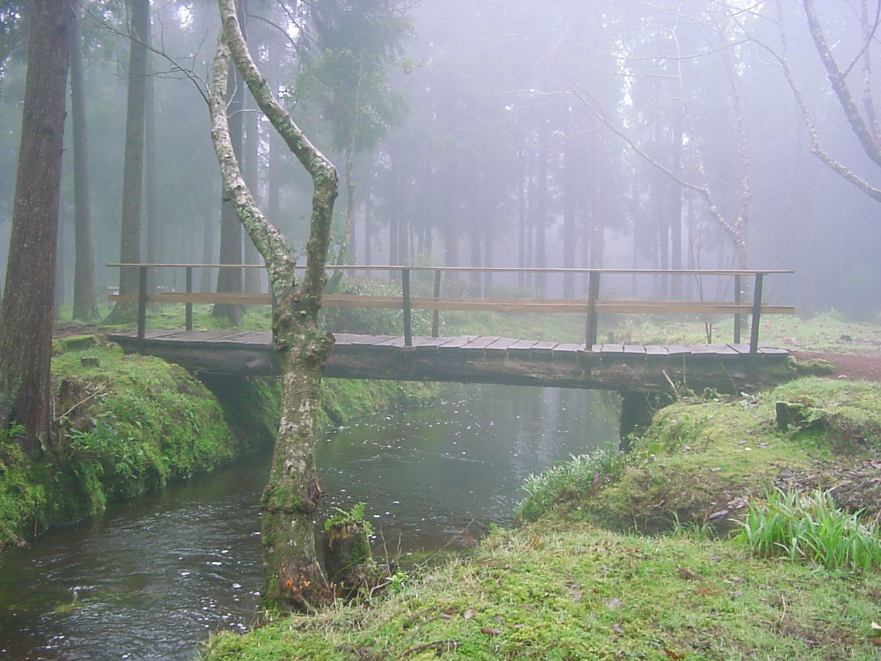 Viveiros da Falca, ponte, ilha Terceira, Açores, Portugal.